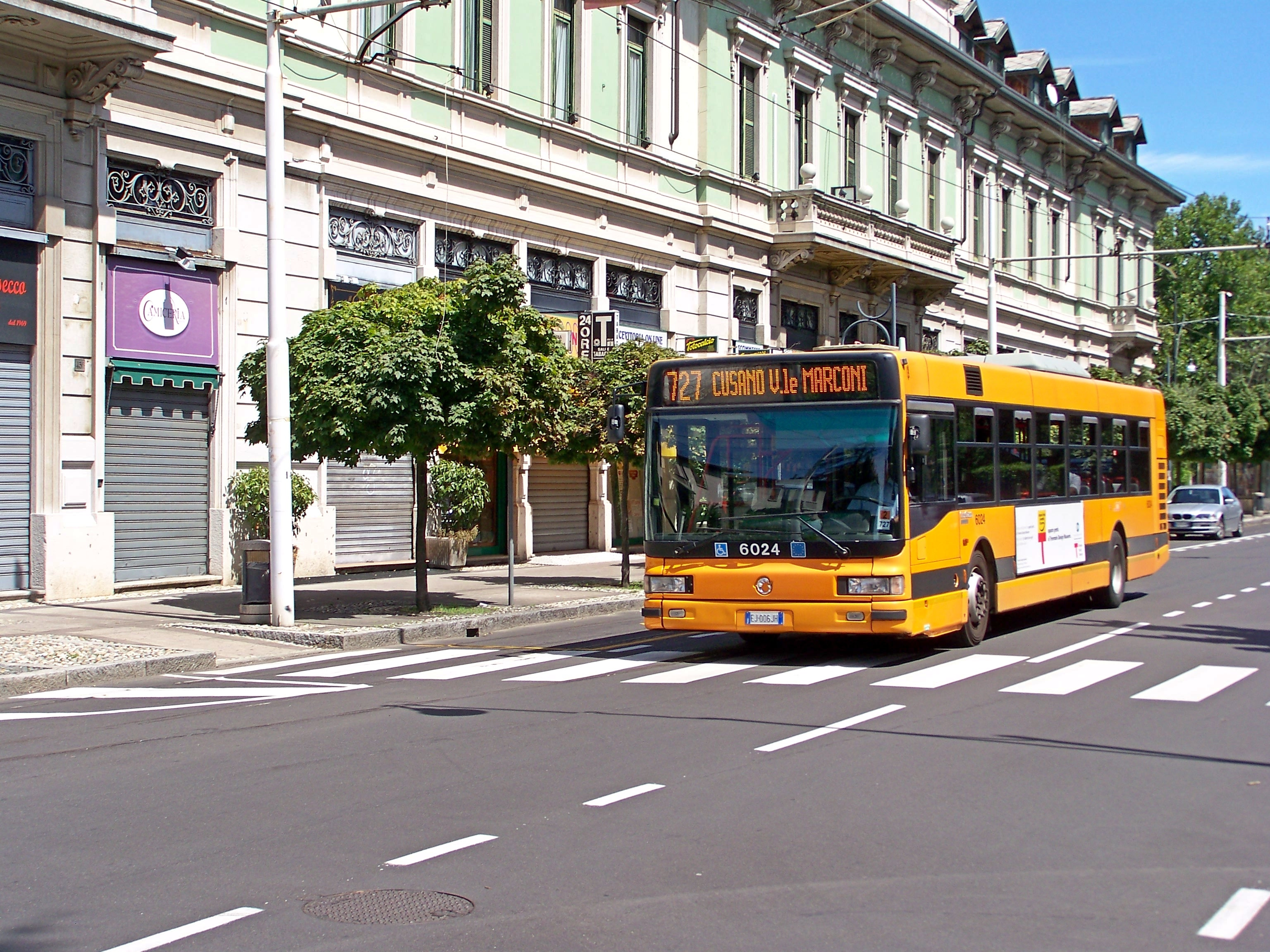 Nei pressi del dismesso raddoppio terminale dell'asta tranviaria Cusano-Milanino passa l'Irisbus CityClass 6024 dell'ATM mentre espleta il servizio 727 Sesto FS-Cusano